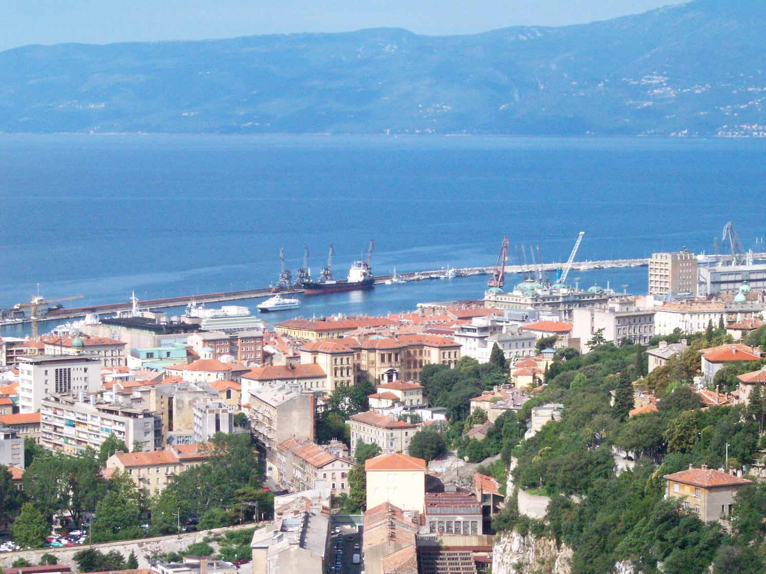 Rijeka (Croatia) Italian and Hungarian name: Fiume